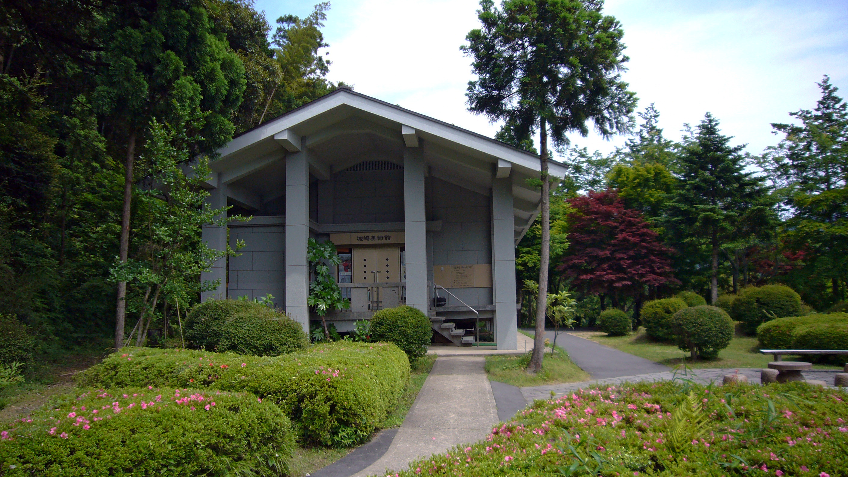 Kinosaki Museum, Kinosaki Onsen in Toyooka, Hyogo prefecture, Japan